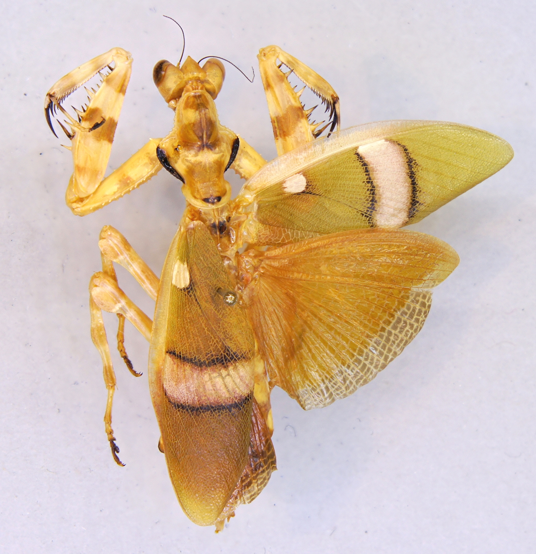 Theopropus elegans (Westwood, 1832) ♀ Herkunft: Malaysia, Cameron Highlands